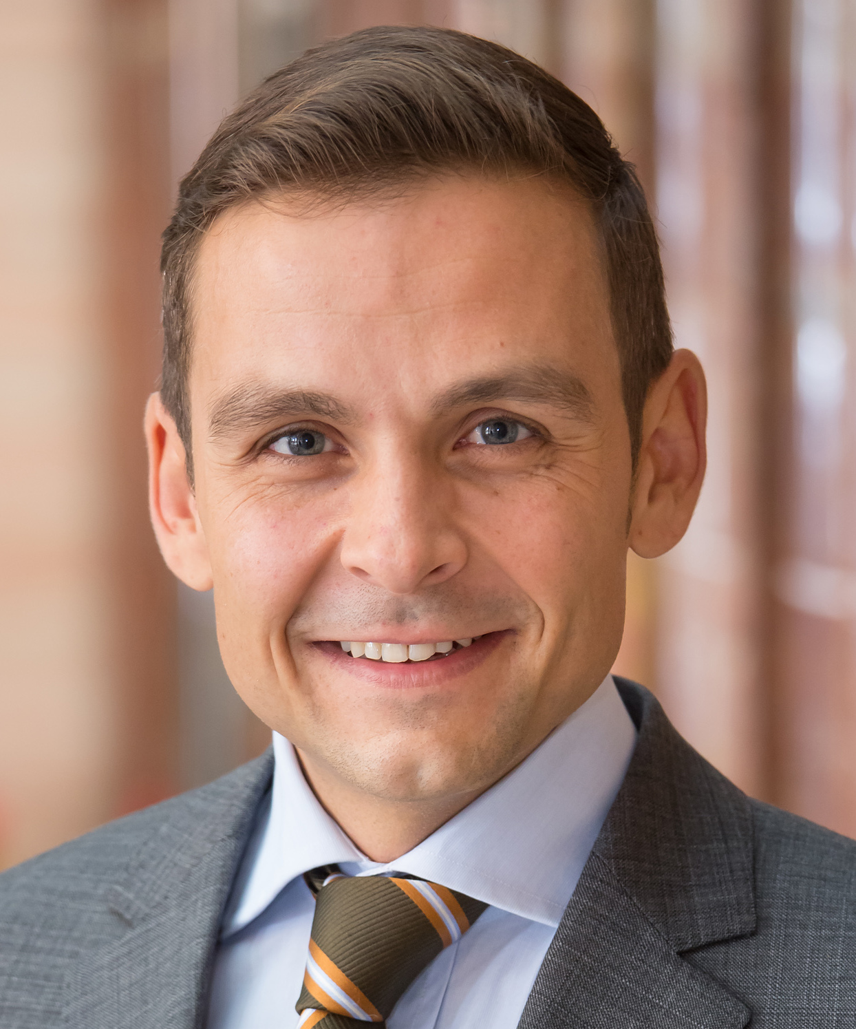 Portraitfoto Gerald Grosz